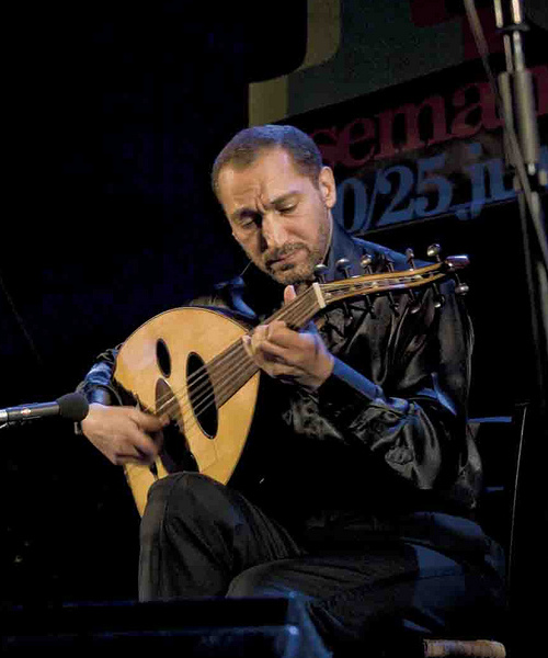 Naseer Shamma en los Encuentros Averroes de Córdoba (2011)